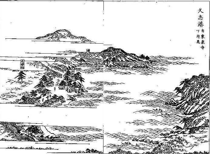 久志秋目郷久志港の挿絵